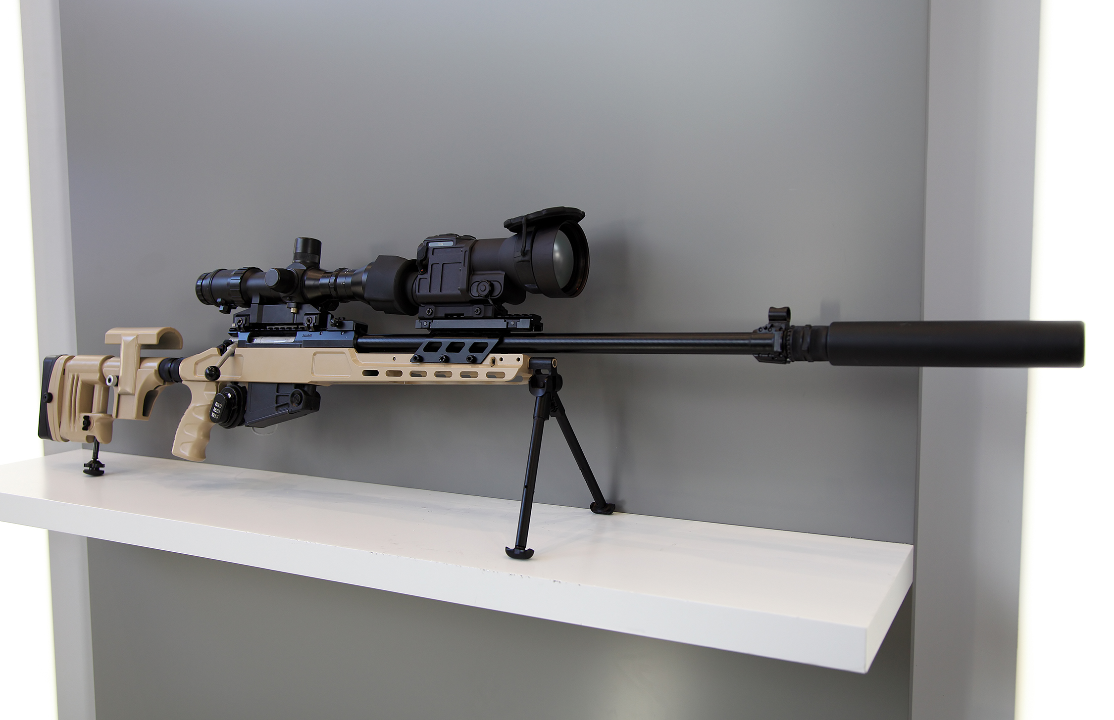 Снайперская винтовка СВ-98